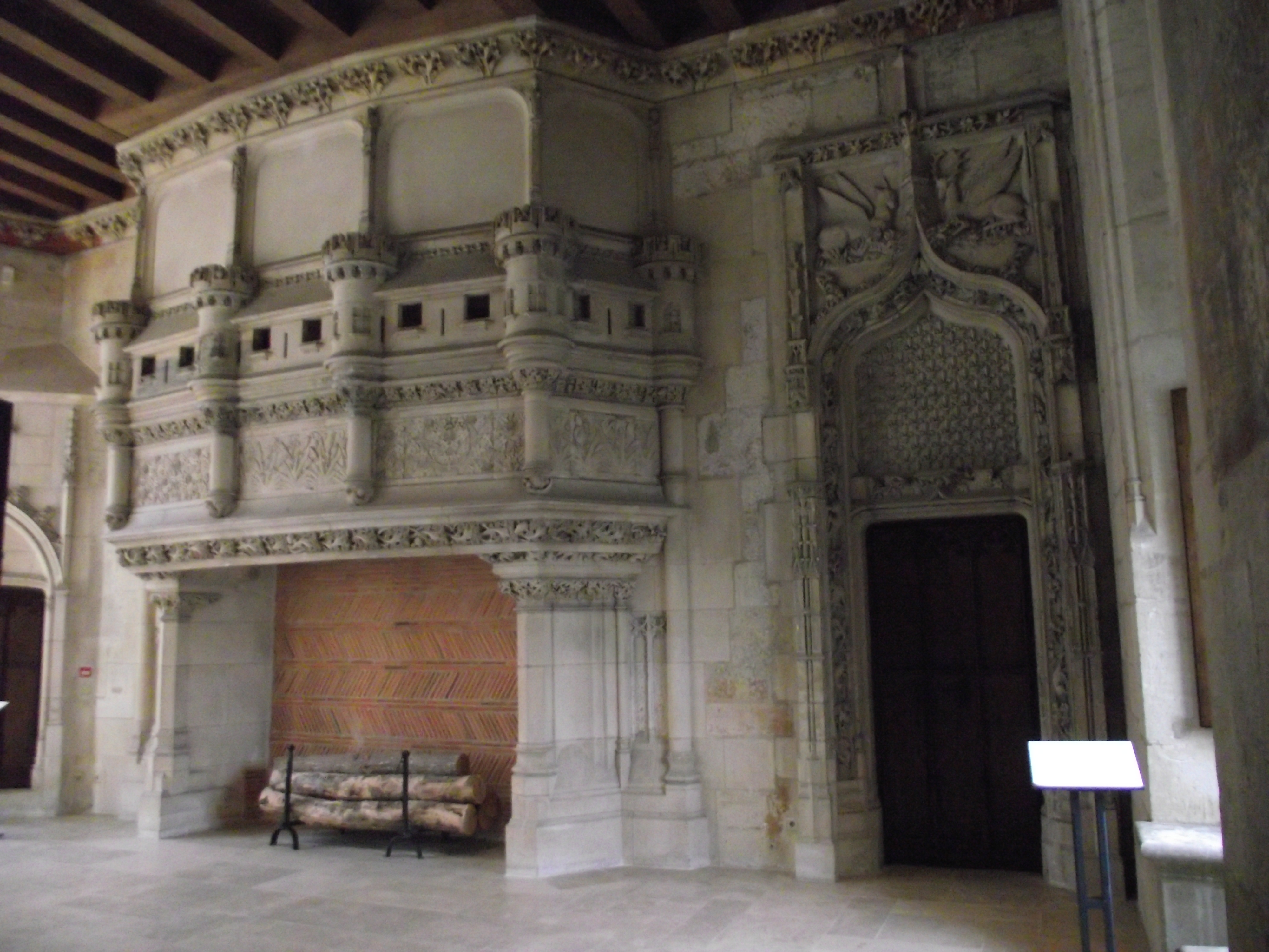 Bourges, Palais Jacques-Cœur, Salle des Festins